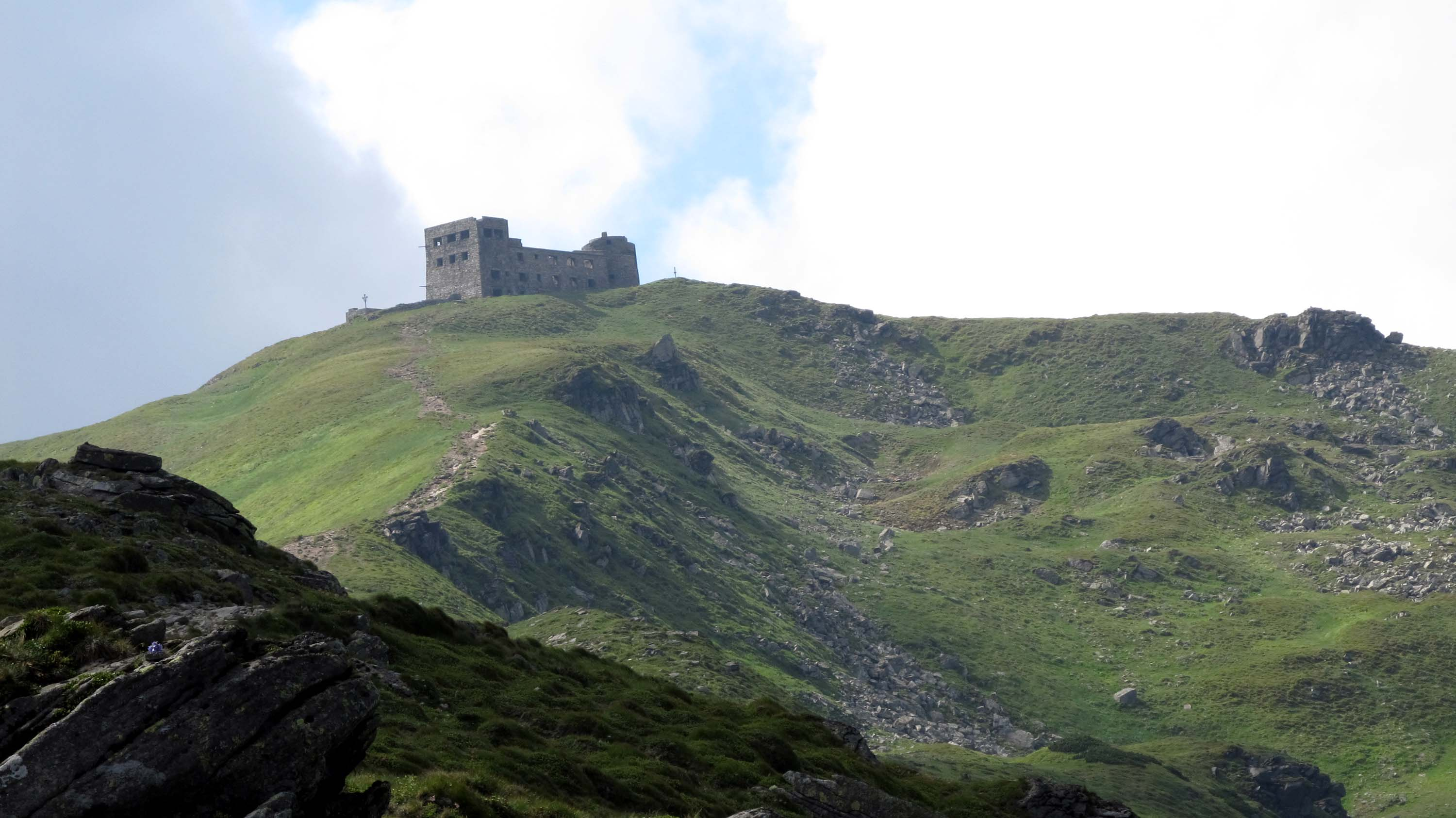 Обсерваторія (мур.) 1937 р Верховинський район с. Зелена, Гора Піп Іван